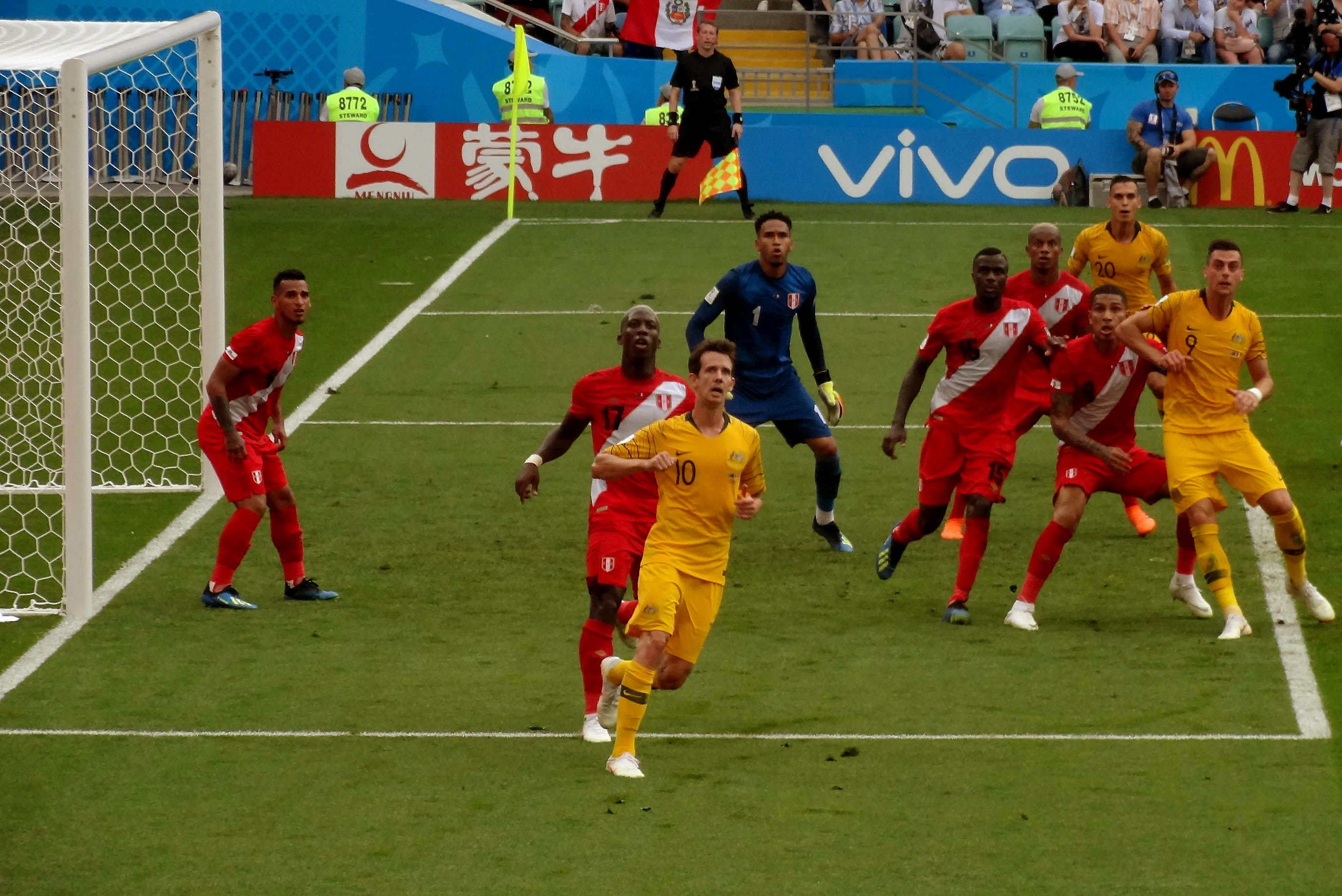 26 июня 2018 года сборная Перу выиграла у сборной Австралии со счётом 2:0, на ЧМ-2018 на стадионе Фишт.